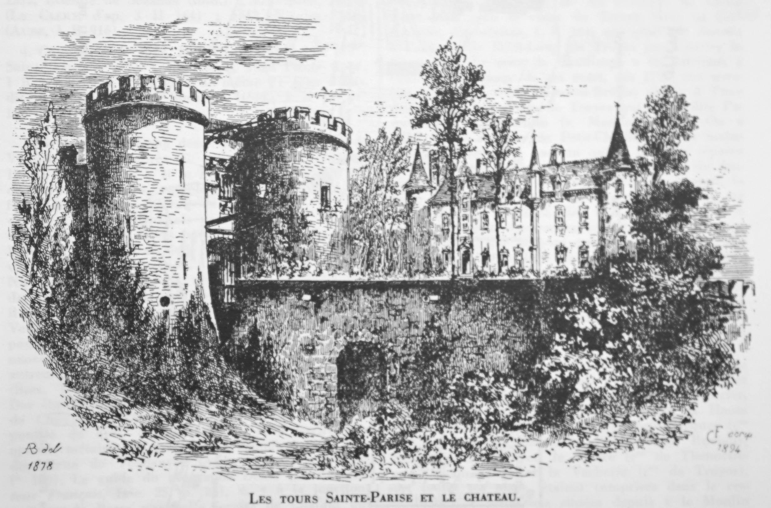 vue ancienne du château.